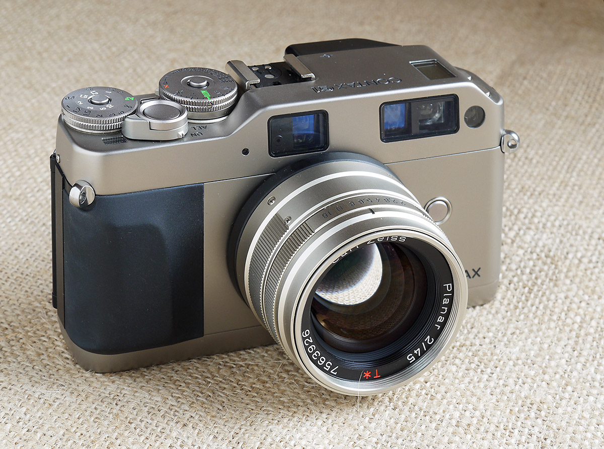 Bild Contax G1